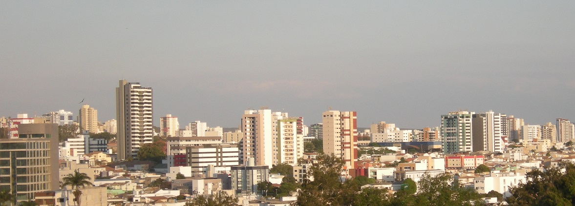 Português do Brasil: Vista panorâmica de Vitória da Conquista, Bahia, Brasil